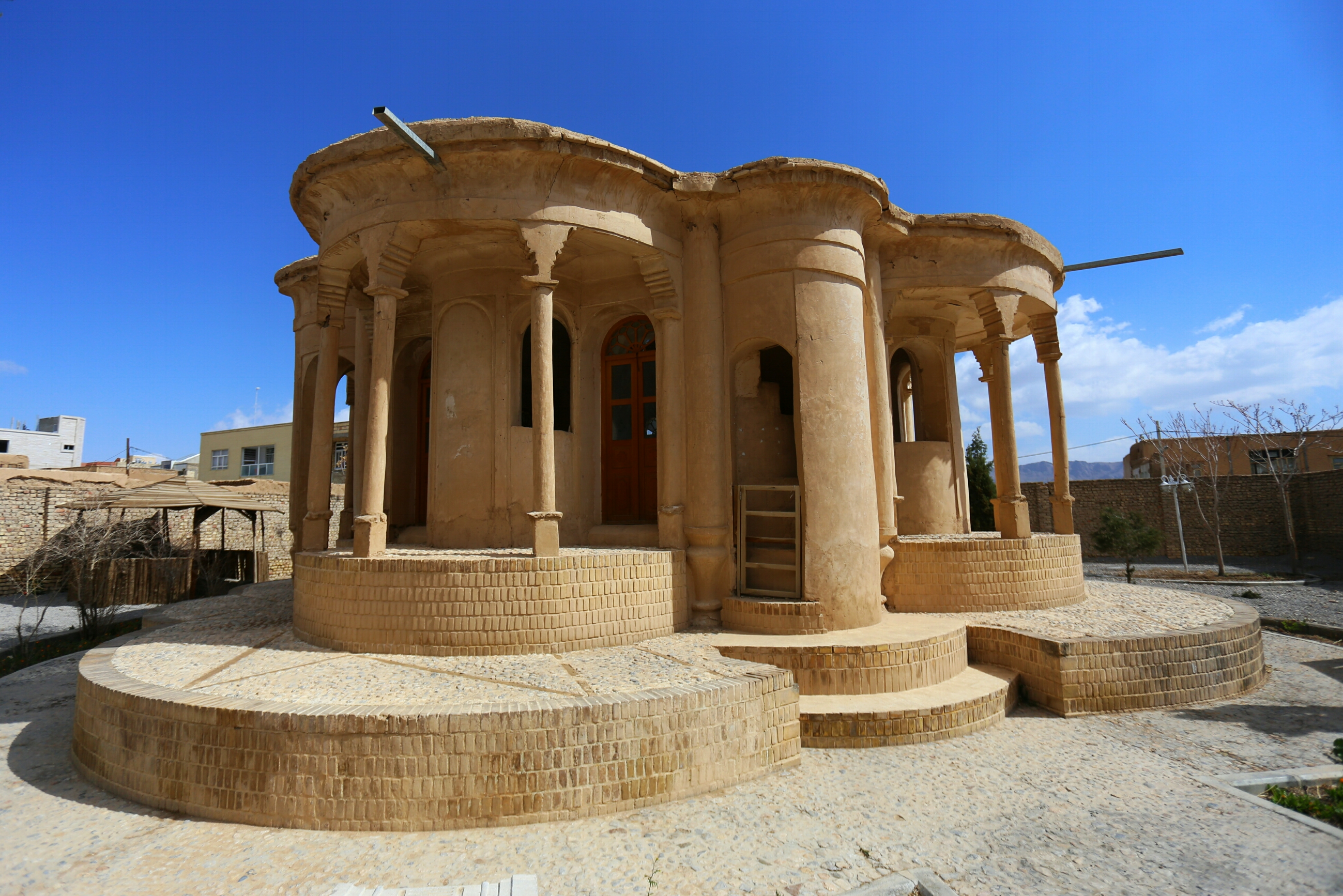 کلاه فرنگی فیروزی